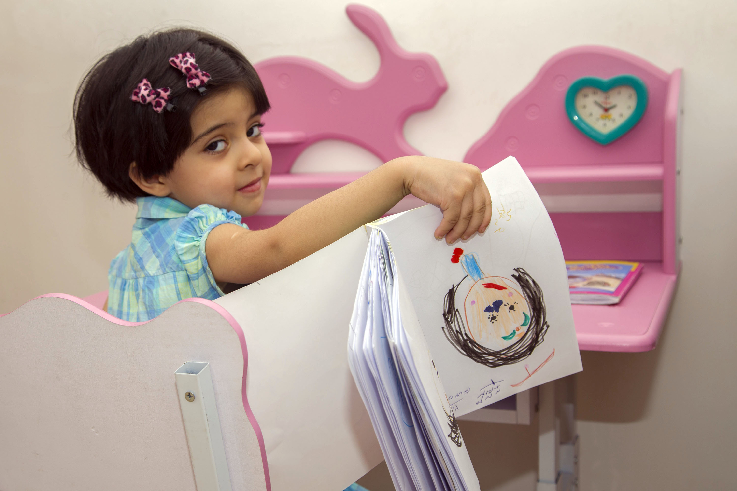 یکی از راه‌ها و وسایل پرورش کودکان که معمولاً کمتر مورد توجه قرار می‌گیرد ولی قبل از هر وسیله و پیش ازهر چیز دیگر می‌تواند به آموزش کمک کند نقاشی است. رنگ و تصویر بیش از هر چیز دیگر ذهن بچه را متوجه خود می‌کند و در عین حال وسیله‌ای است که بچه قبل از هر چیز می‌تواند به خلق آن بپردازد. برای درک رنگ و تصویر کافی است که چشم بببیند و برای خلق ان کافی است که بچه دست در رنگ کند و آن را بر در و دیوار یا روی هر چه که دم دستش باشد حتی به سر و صورت و لباس خود بمالد. اگر نقاشی عمیق‌ترین وسیله آموزش کودک نباشد می‌توان گفت یکی از مهمترین و اولین وسیله آموزش اوست.